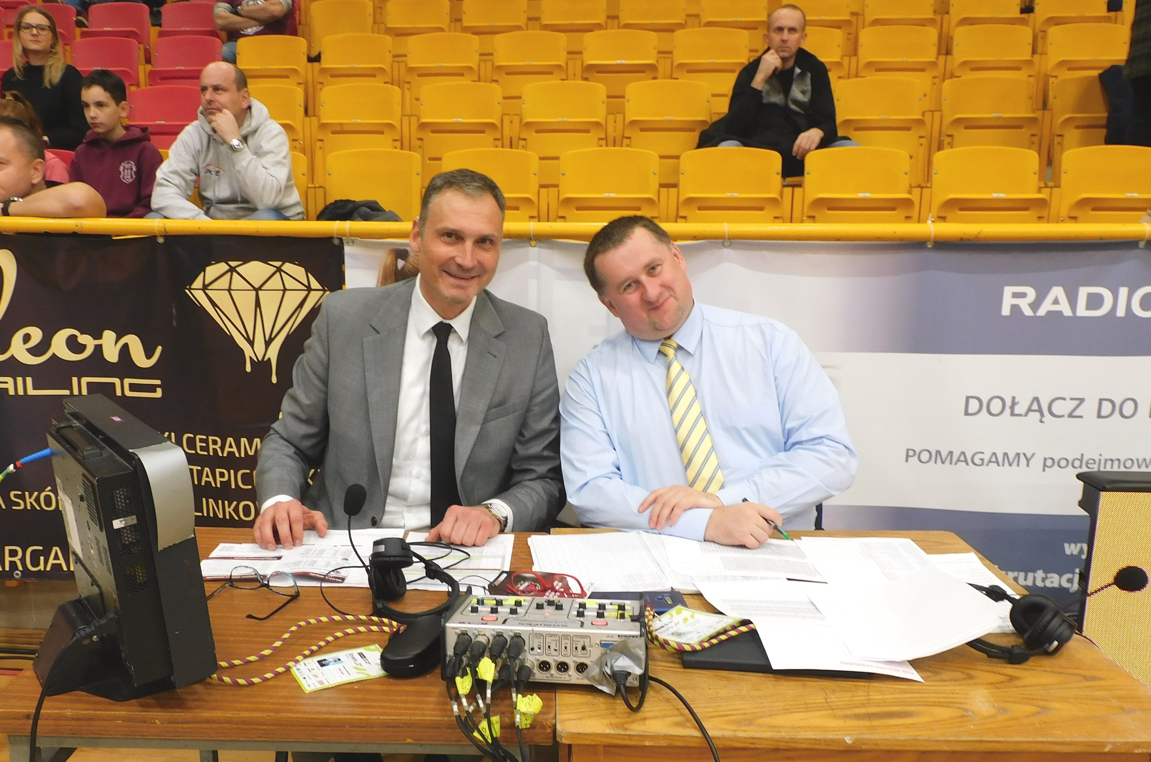 Stargard. Komentatorzy Polsat Sport - Tomasz Jankowski i Adam Romański